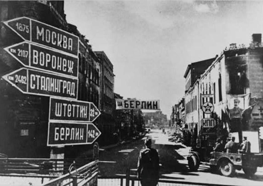 Obecna ul. Wyszyńskiego (dawna Bahnhofstrasse) w 1945 r., widziana od strony pl. Wolności